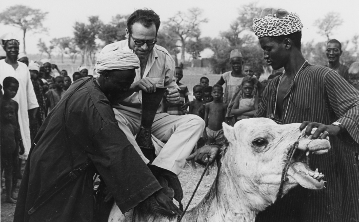 De man die de dromedaris in bedwang houdt is de eigenaar van het dier. Zie ook inventarisnummer 20010501 en 20010502.